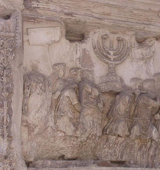 Auteur: Guilhem Dulous